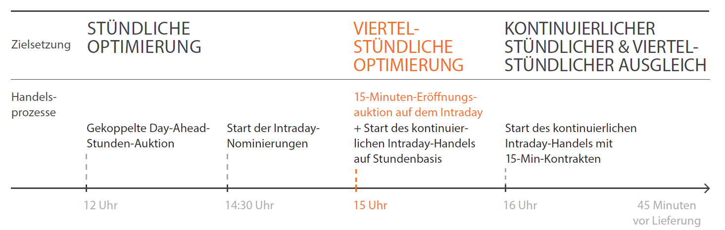 Timeline der von EPEX SPOT betriebenen Strommärkte